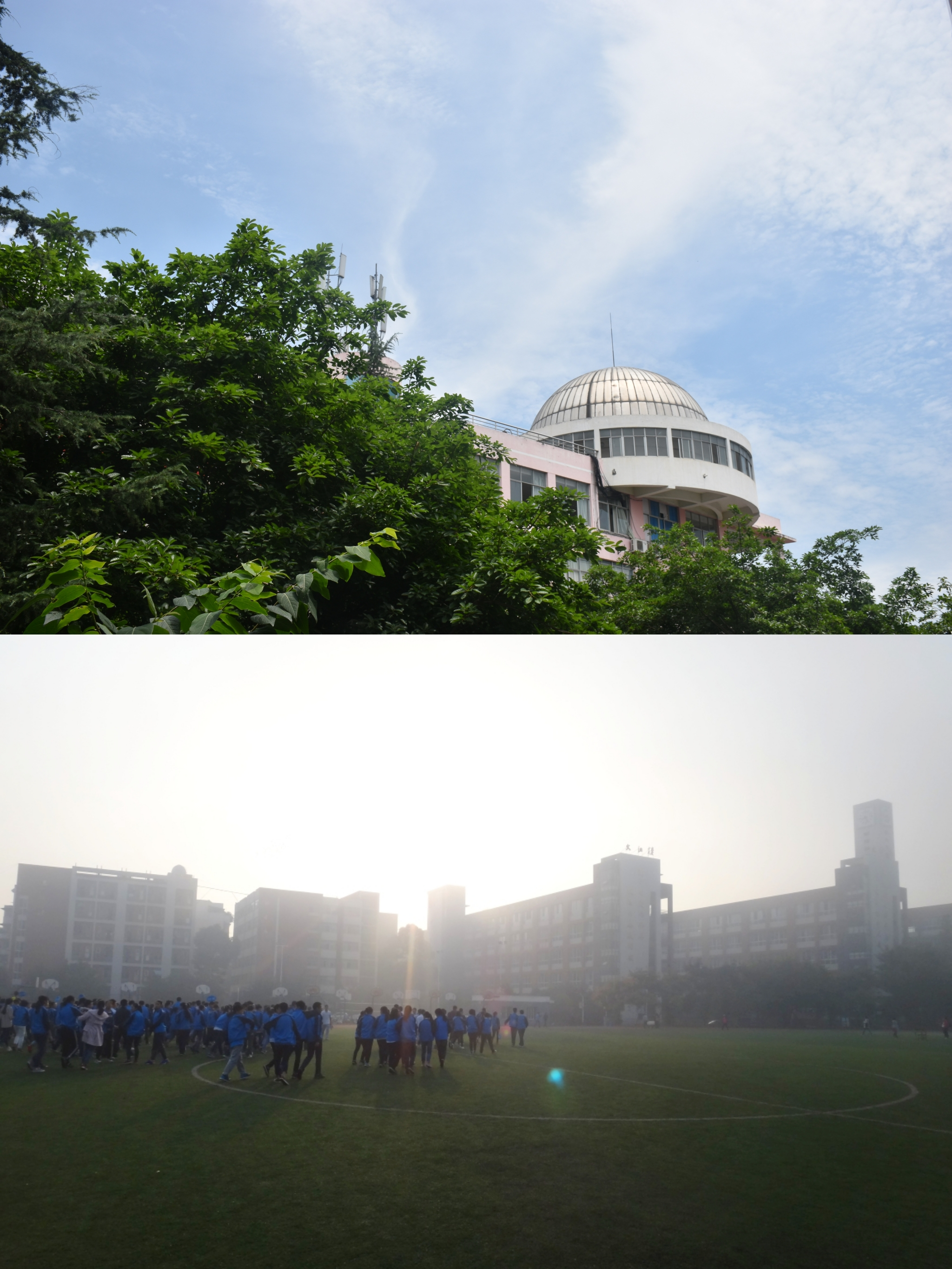 上图：德阳中学高中部一景 下图：德阳中学初中部教学楼